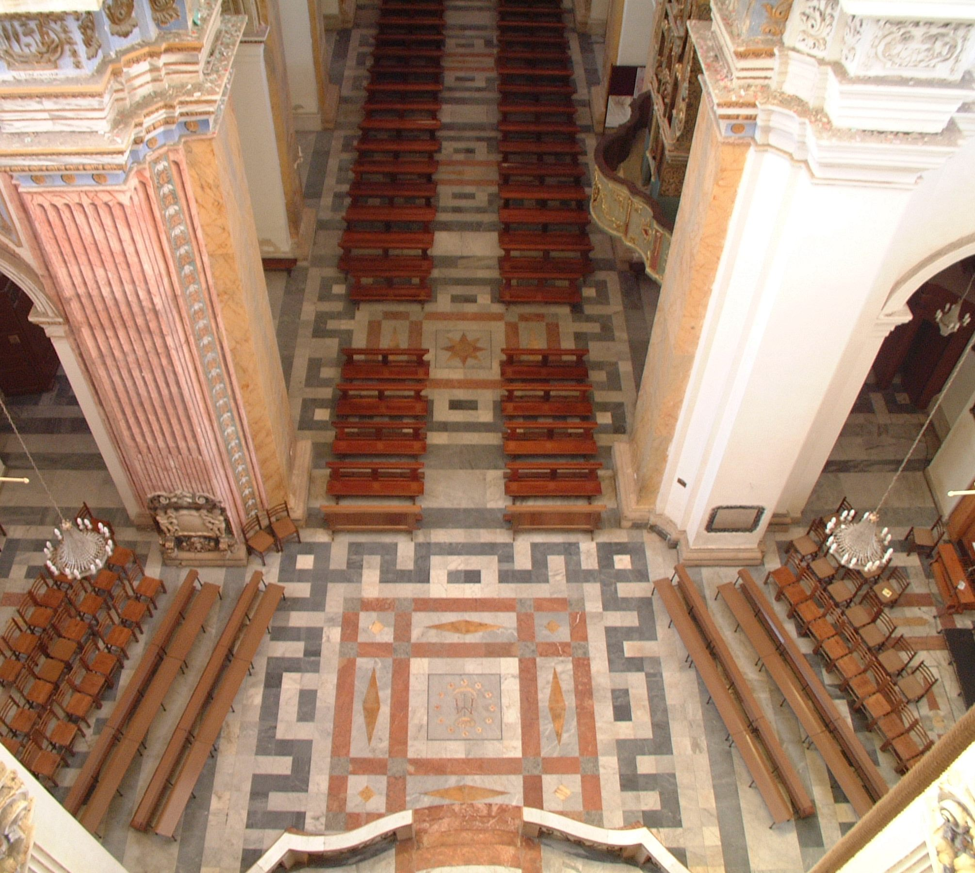 Chiesa Madre - Santa Maria delle Stelle - Interno navata centrale